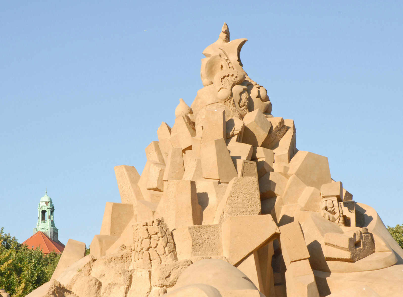 Festival de sculptures en sable à Berlin au bord de la Spree près de la gare centrale.